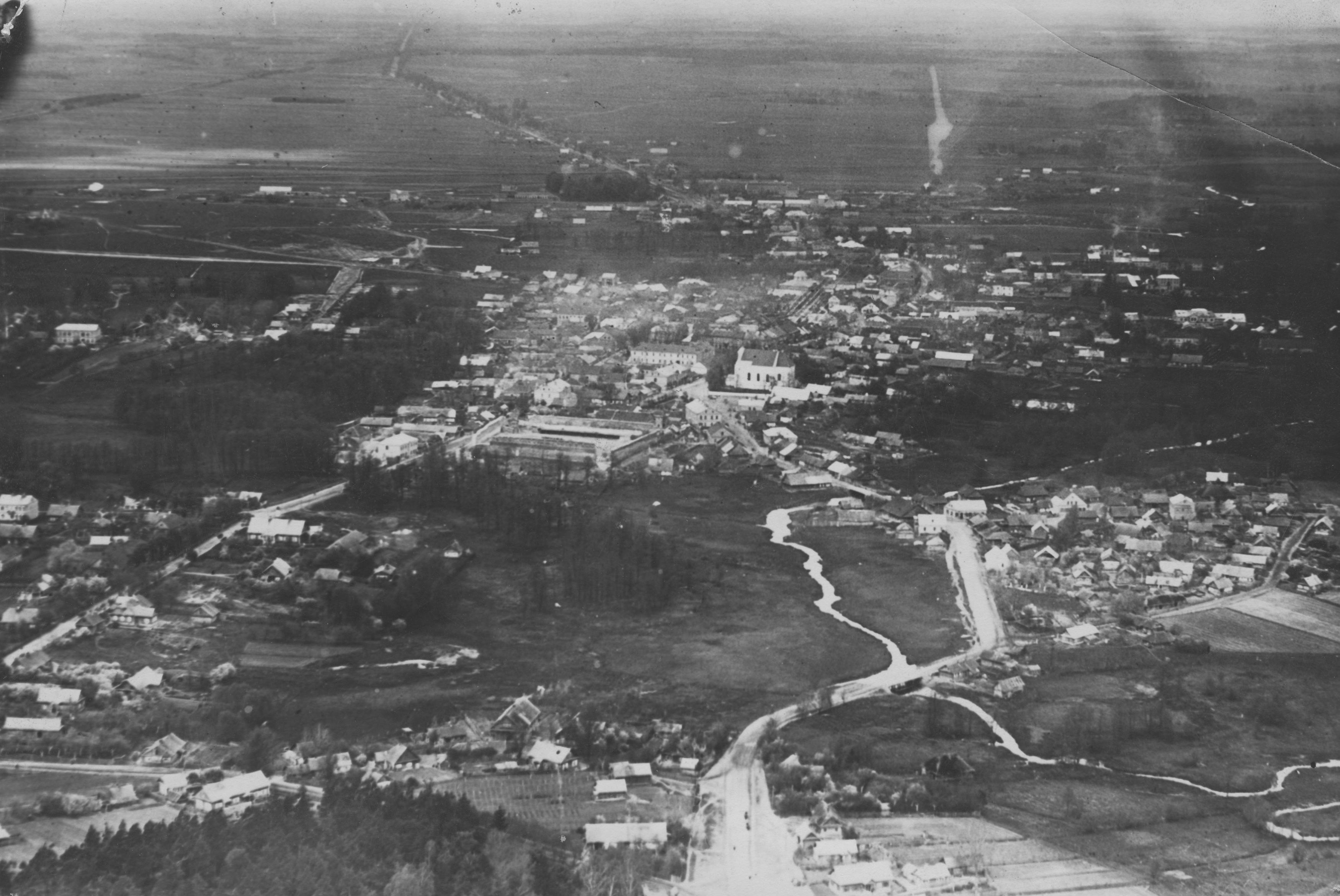 Беларуская (тарашкевіца): Ліда (Lida). Аэрафотаздымак